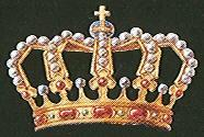 Eigen tekening naar een afbeelding uit 1900. Dit is de heraldische koningskroon. De kroon is niet gevoerd. De werkelijke kroon ziet er heel anders uit.